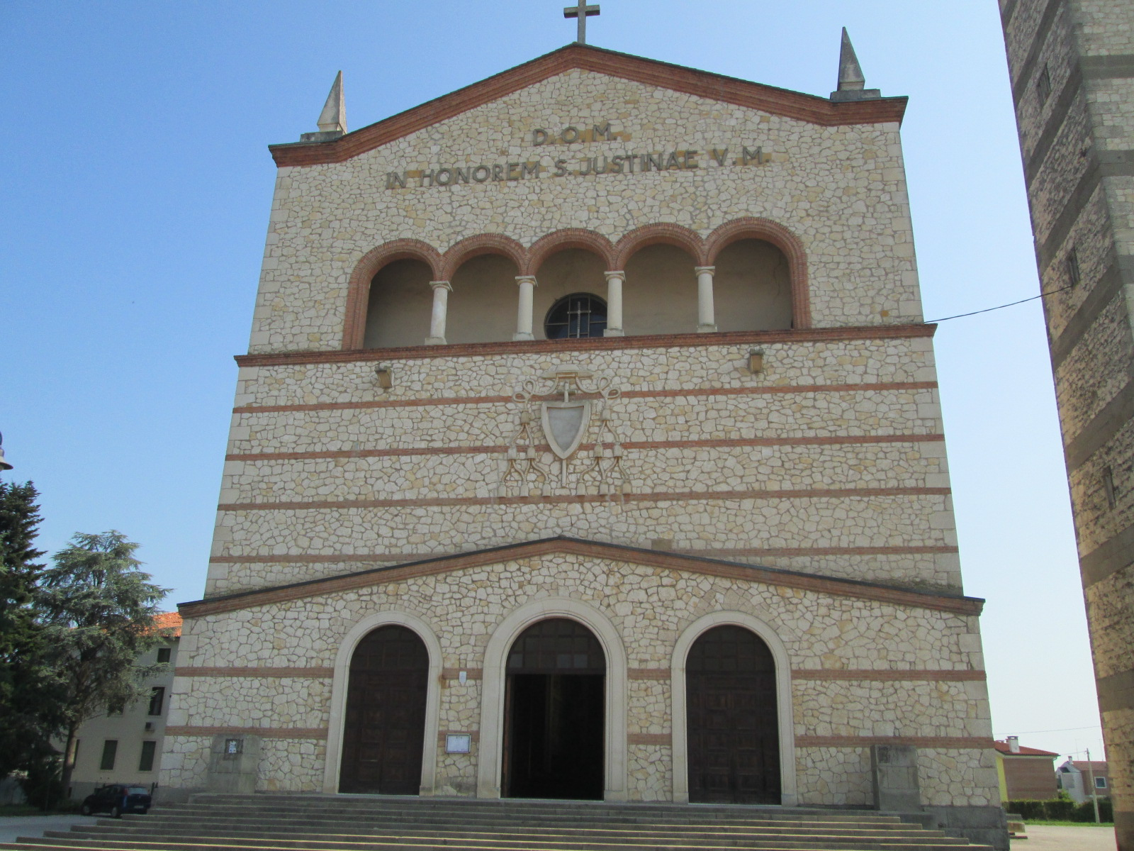 Facciata della Chiesa di S. Giustina, Montegalda (VI), Italia